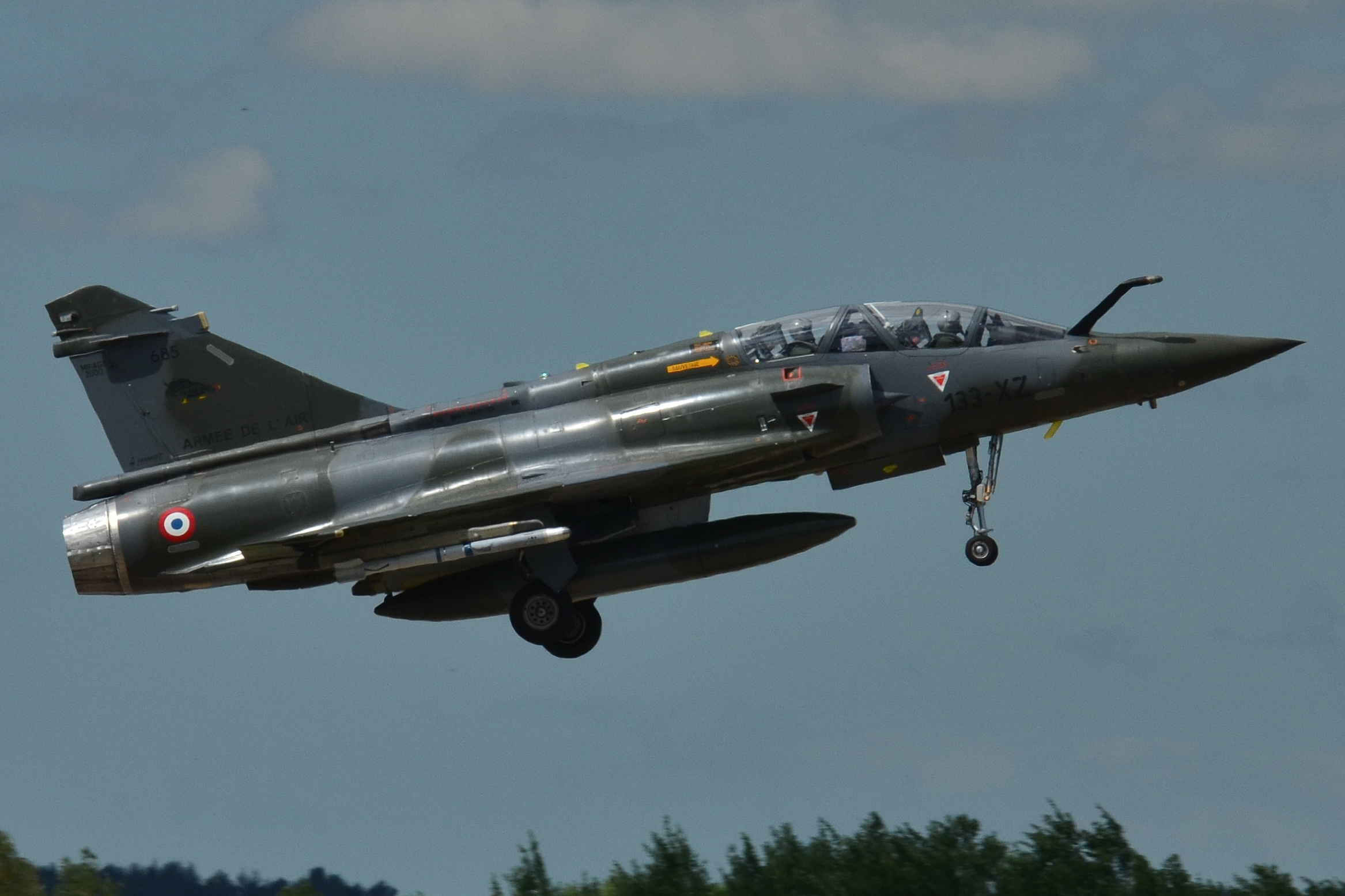 Photo prise à la BA-701 de Salon de Provence (LFMY) en France. Picture take at Salon de Provence AB - BA-701 (LFMY) in France.